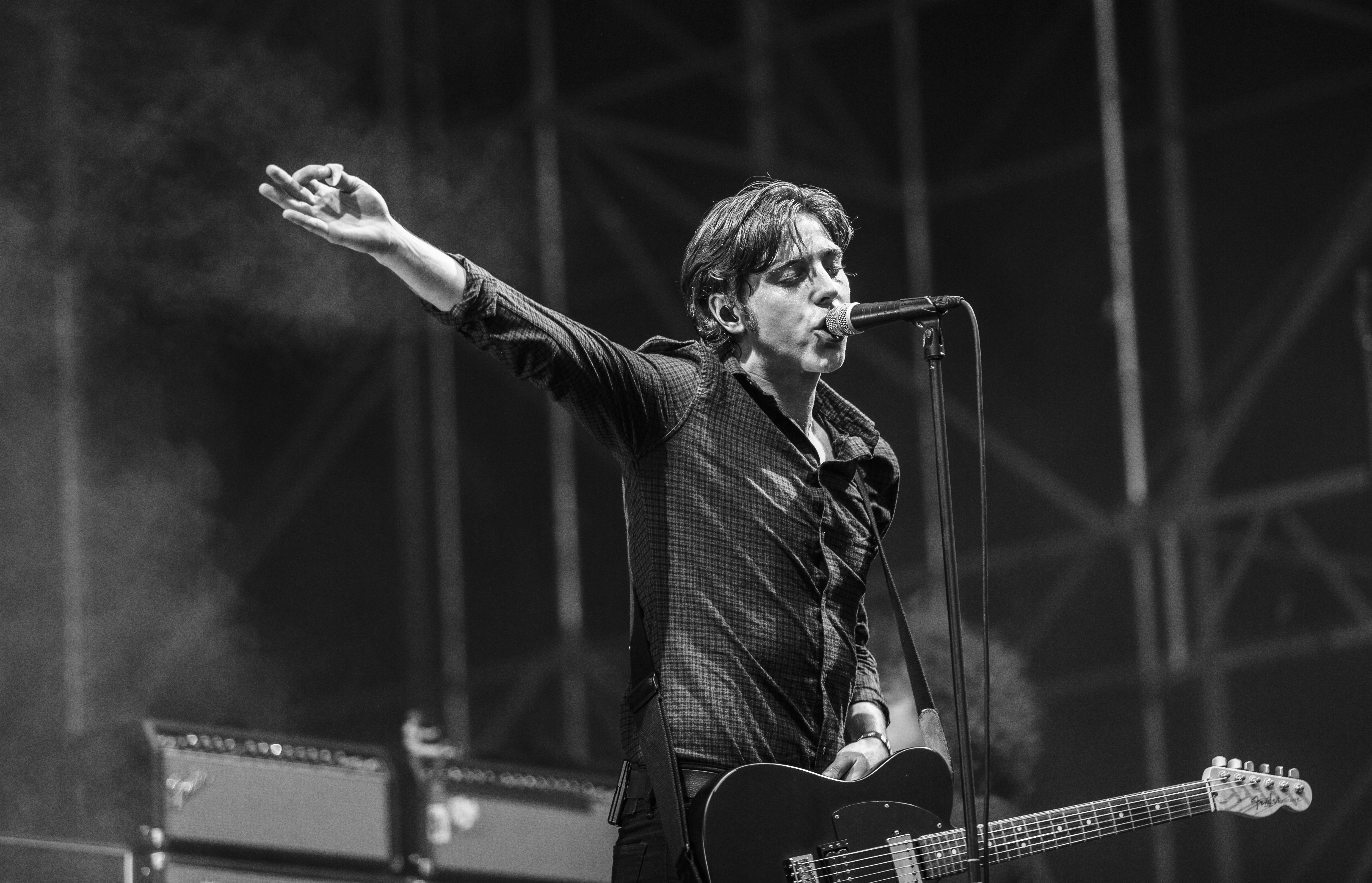 FIB 2016